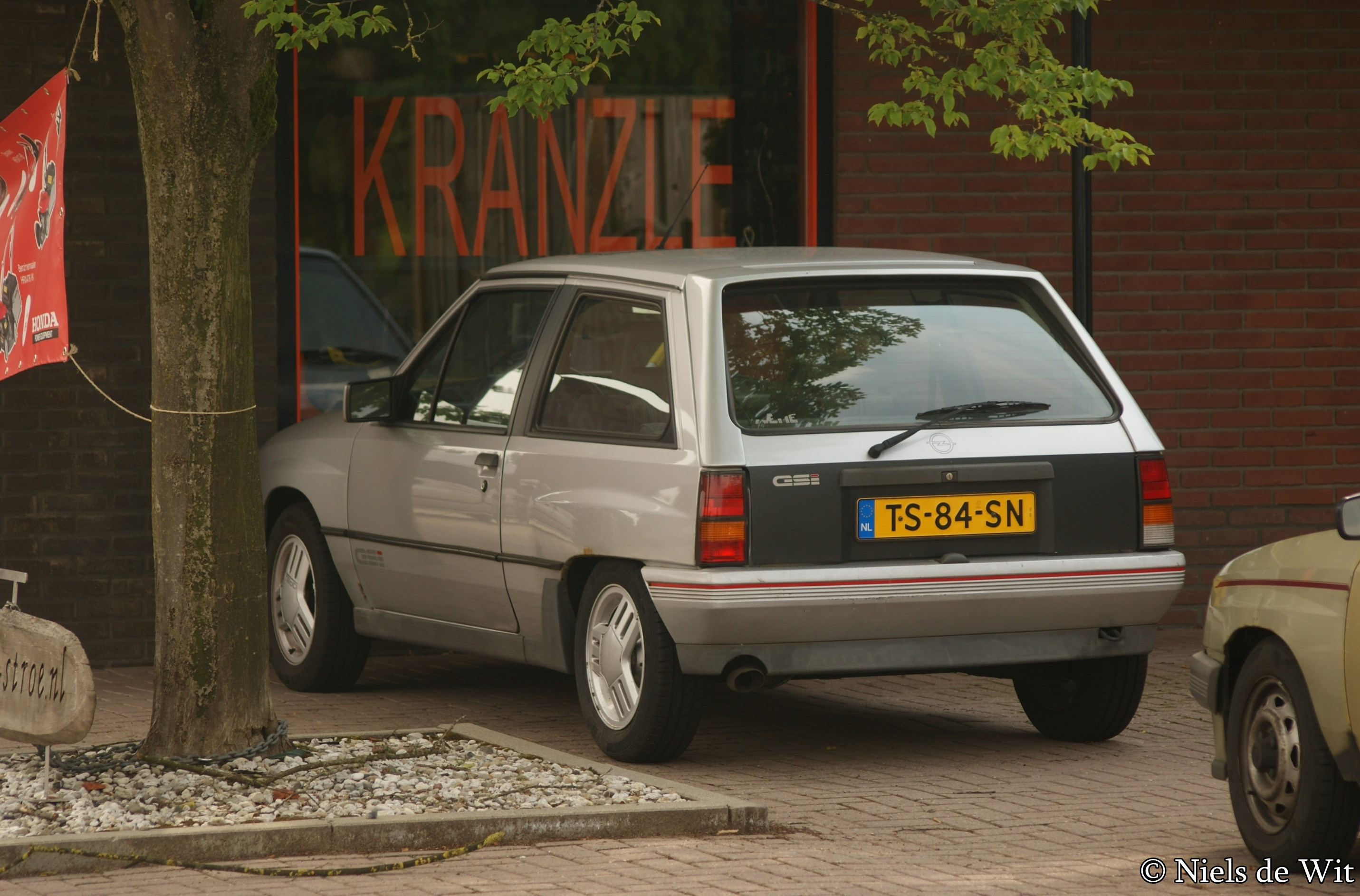 TS-84-SN